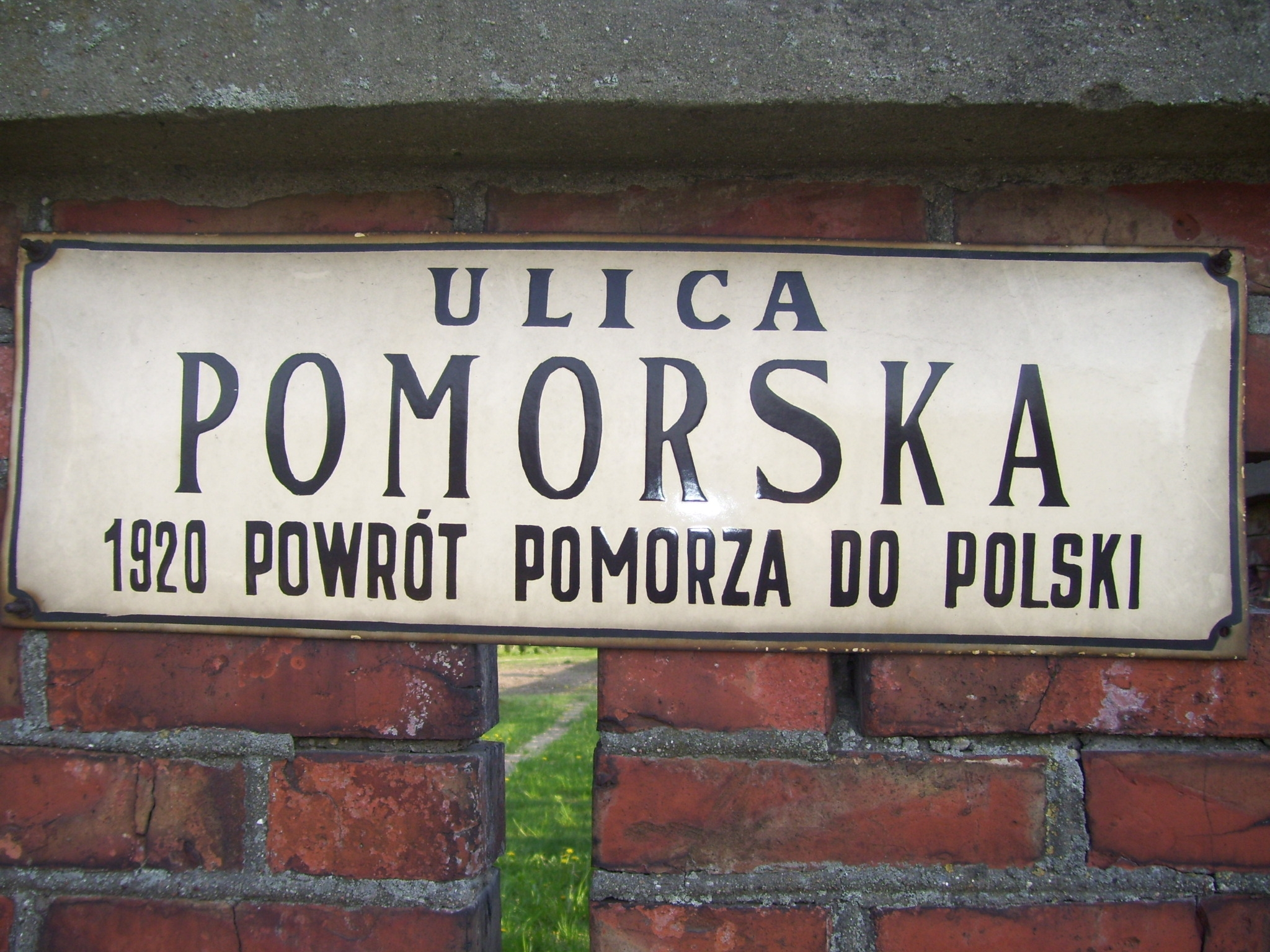 Tablica uliczna wg systemu, który obowiązywał w Łodzi do 1994 (był on także stosowany w pozostałych miejscowościach starego, aglomeracyjnego województwa łódzkiego). Ulica Pomorska. W okresie PRL-u - Marcelego Nowotki, a w czasie wojny - Friedrichstrasse.